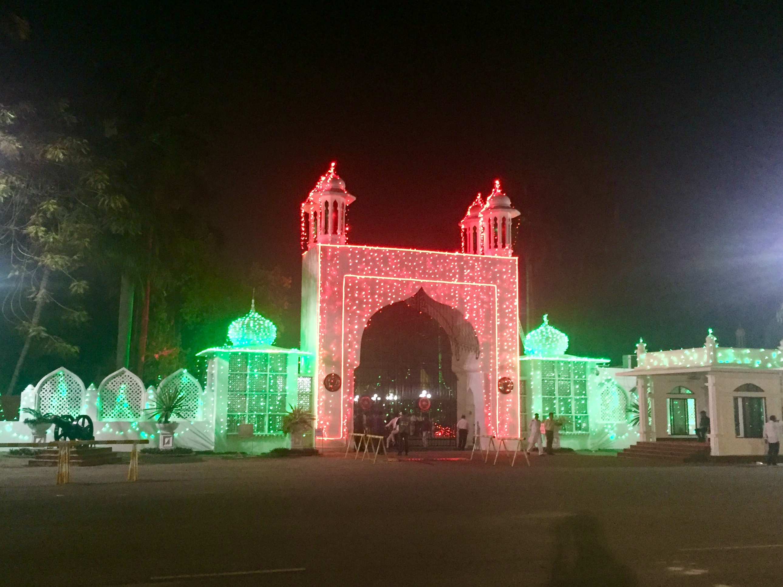 বঙ্গভবন, গণপ্রজাতন্ত্রী বাংলাদেশ সরকারের মহামান্য রাস্ট্রপতির বাসভবন।